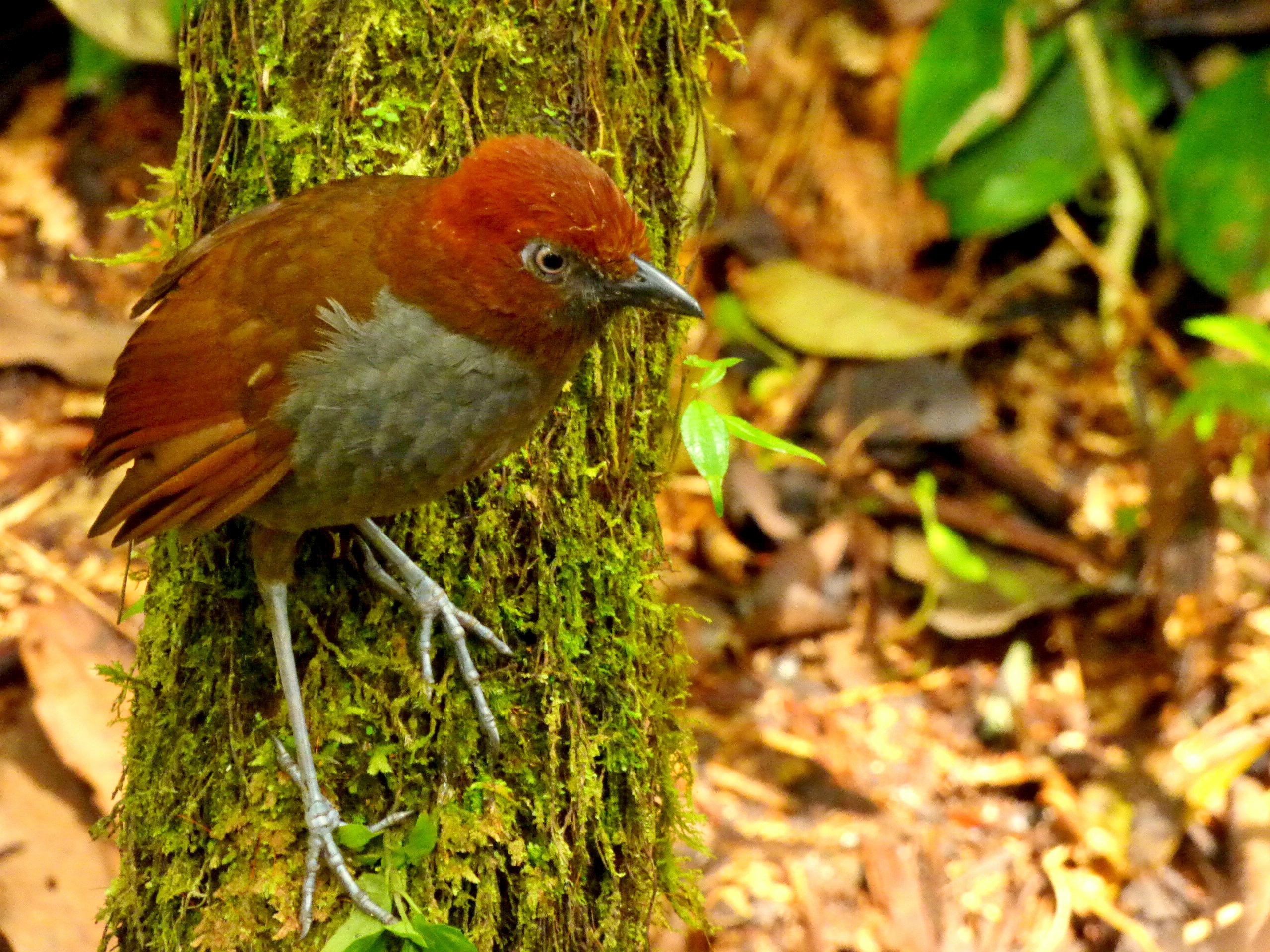 Grallaria nuchalis